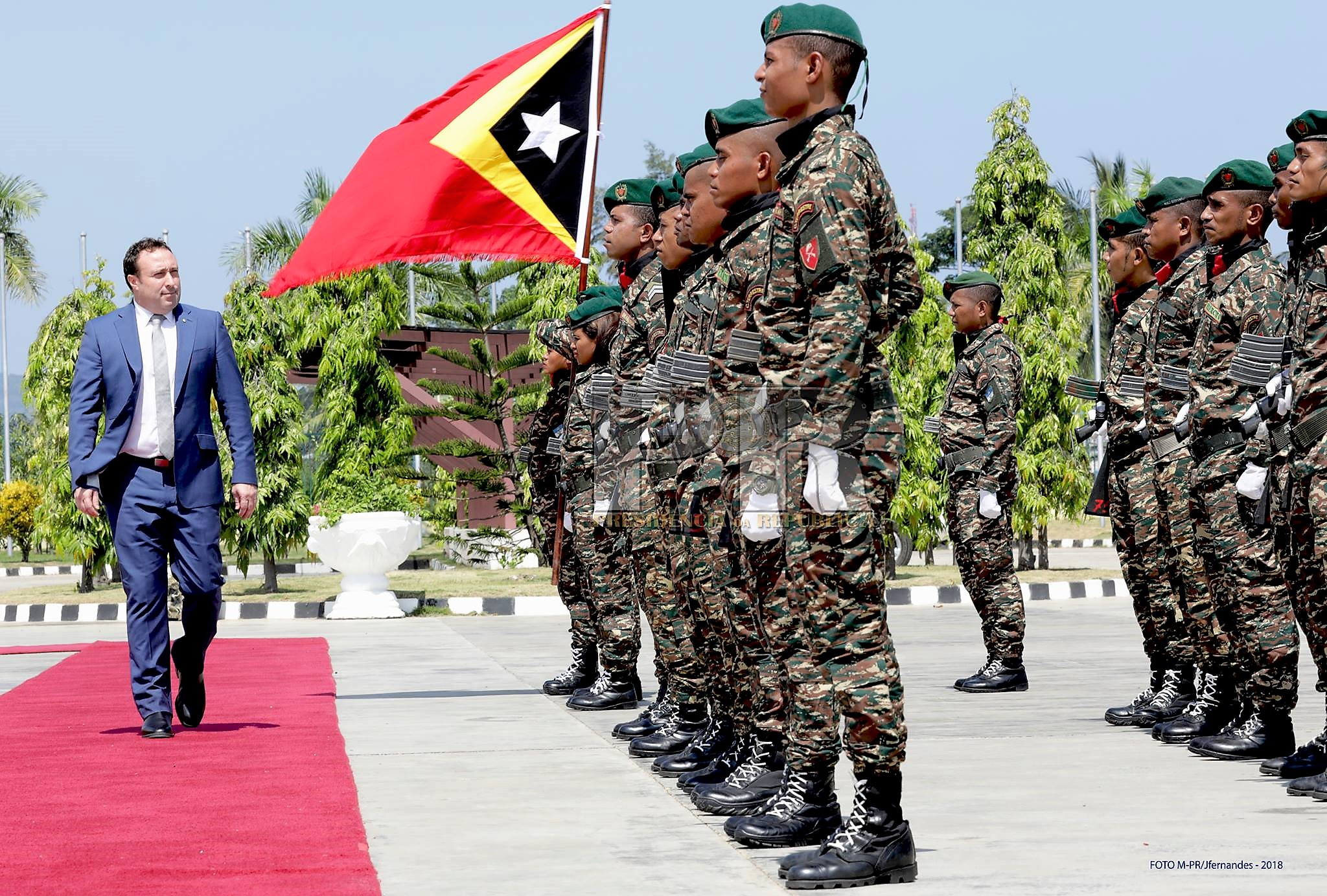 Peter Llewelyn Roberts, australischer Botschafter in Osttimor bei seiner Amtseinführung in Dili